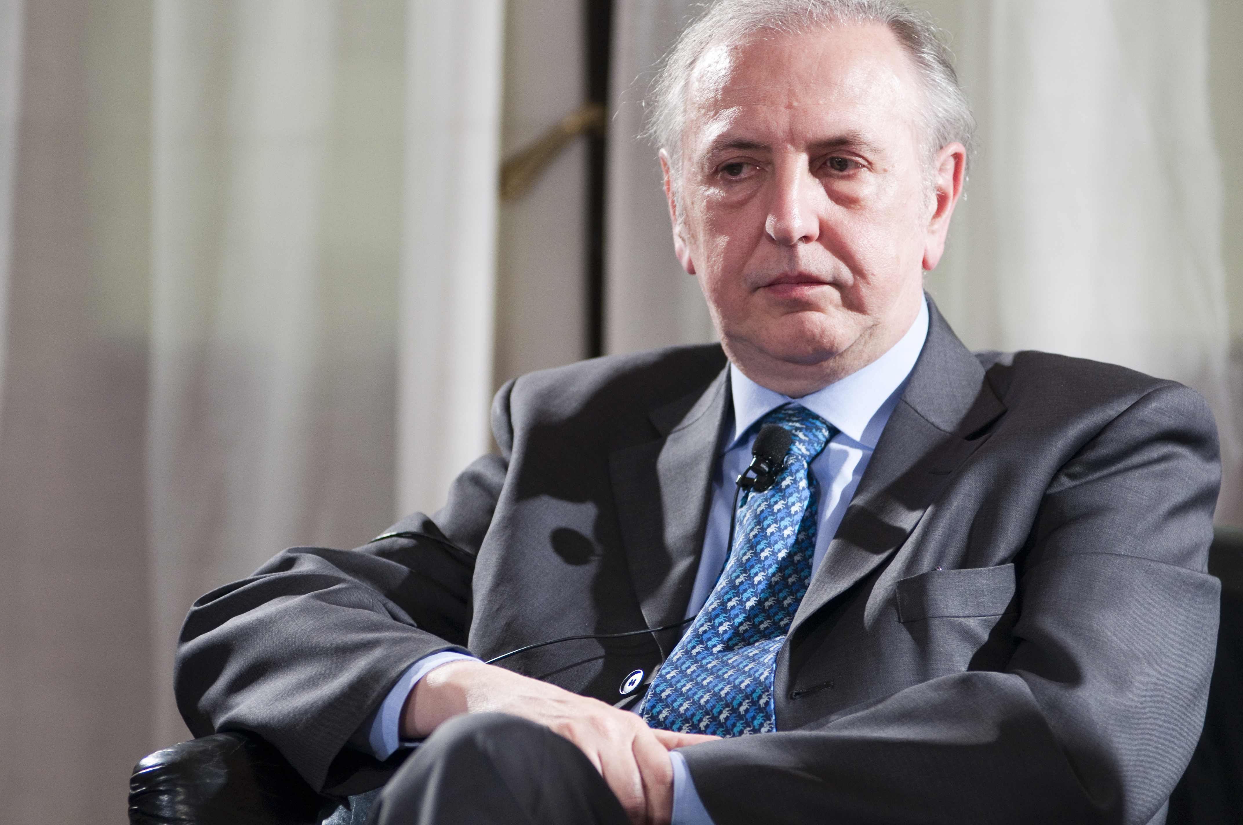 Lorenzo Del Boca